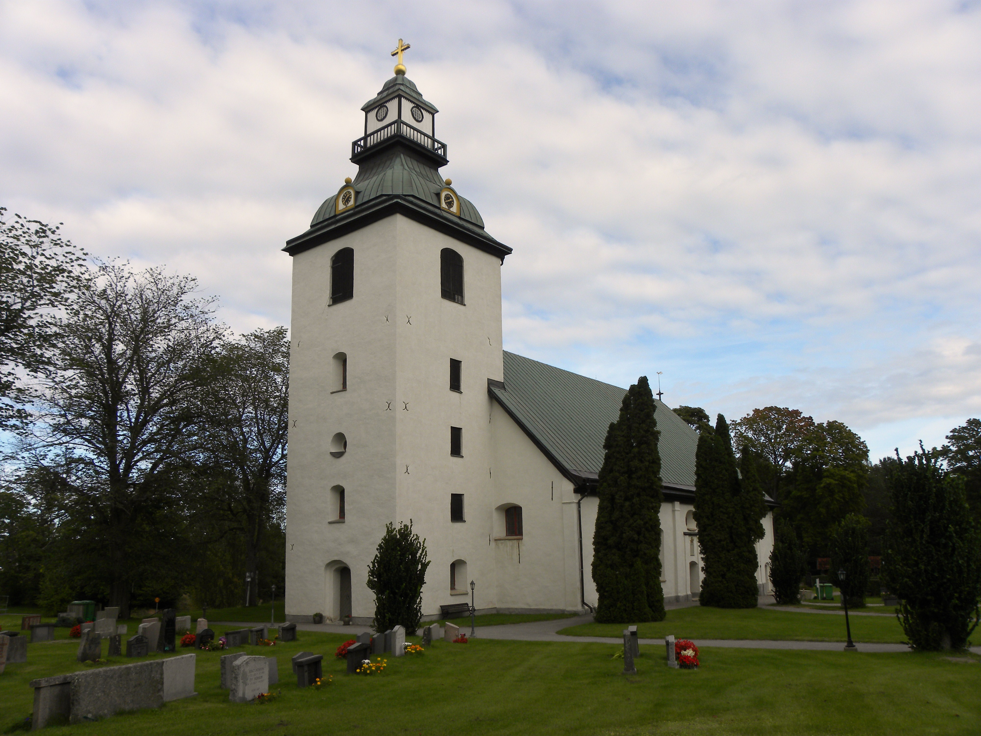 Kirche von Loftahammar